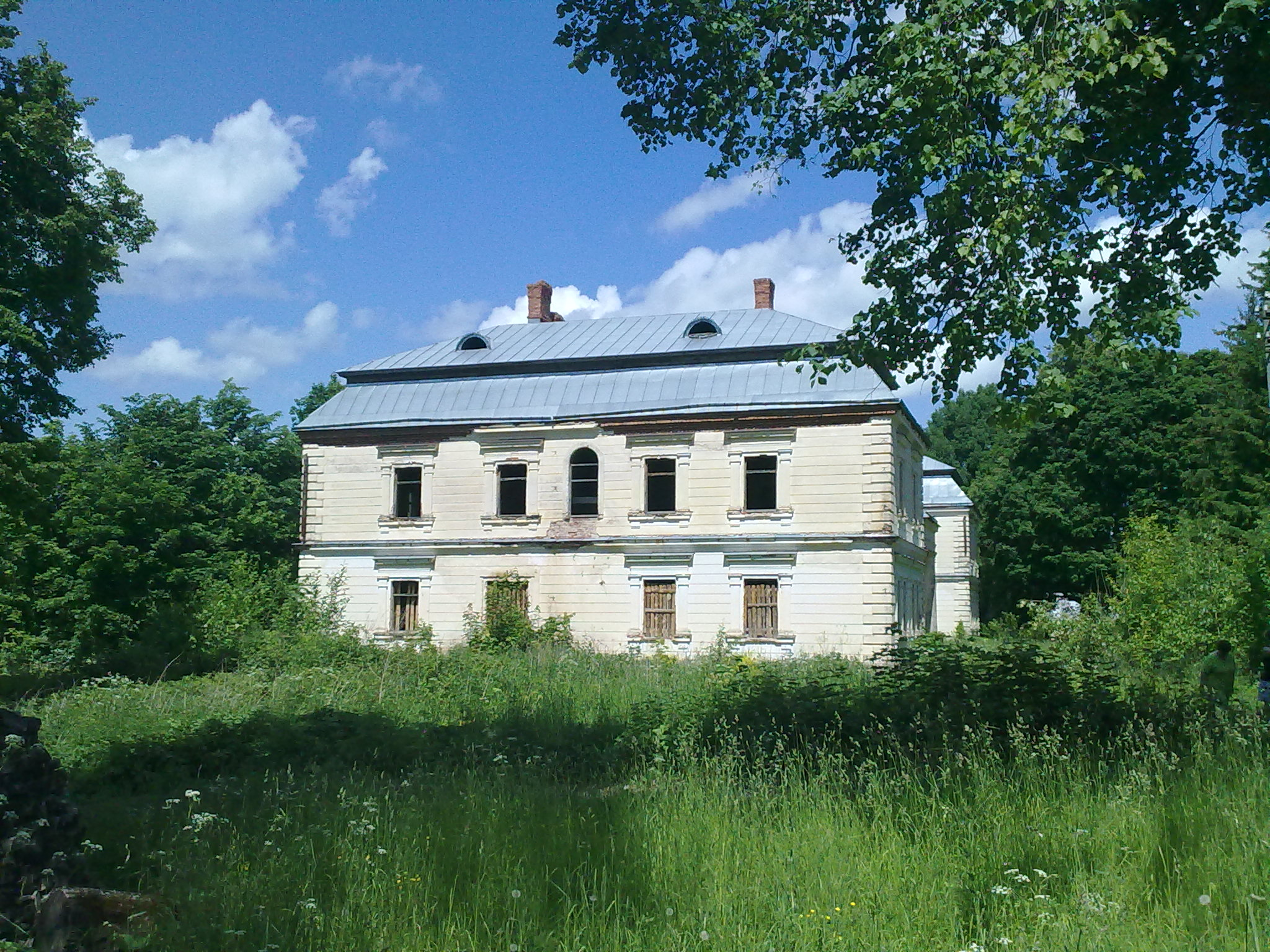 Палац у Опсе